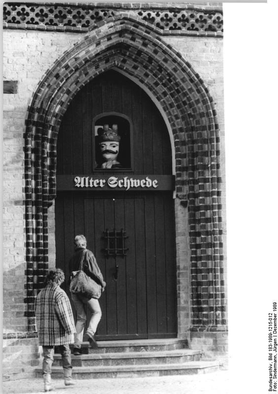 Wismar, "Der Alte Schwede", "Schwedenkopf", Eingangsportal ADN-ZB Sindermann 15.12.89 Bez. Rostock: "Alter Schwede"- Nicht nur das Eingangsportal ist schön an dem ältesten Wismarer Haus, das im Jahre 1380 gebaut wurde. Die gotische Türfassung wird durch einen originellen "Schwedenkopf" ergänzt, der aus der Tür von oben auf die Besucher äugt. Die Gaststätte "Alter Schwede" ist seit dem Herbst wieder geöffnet.